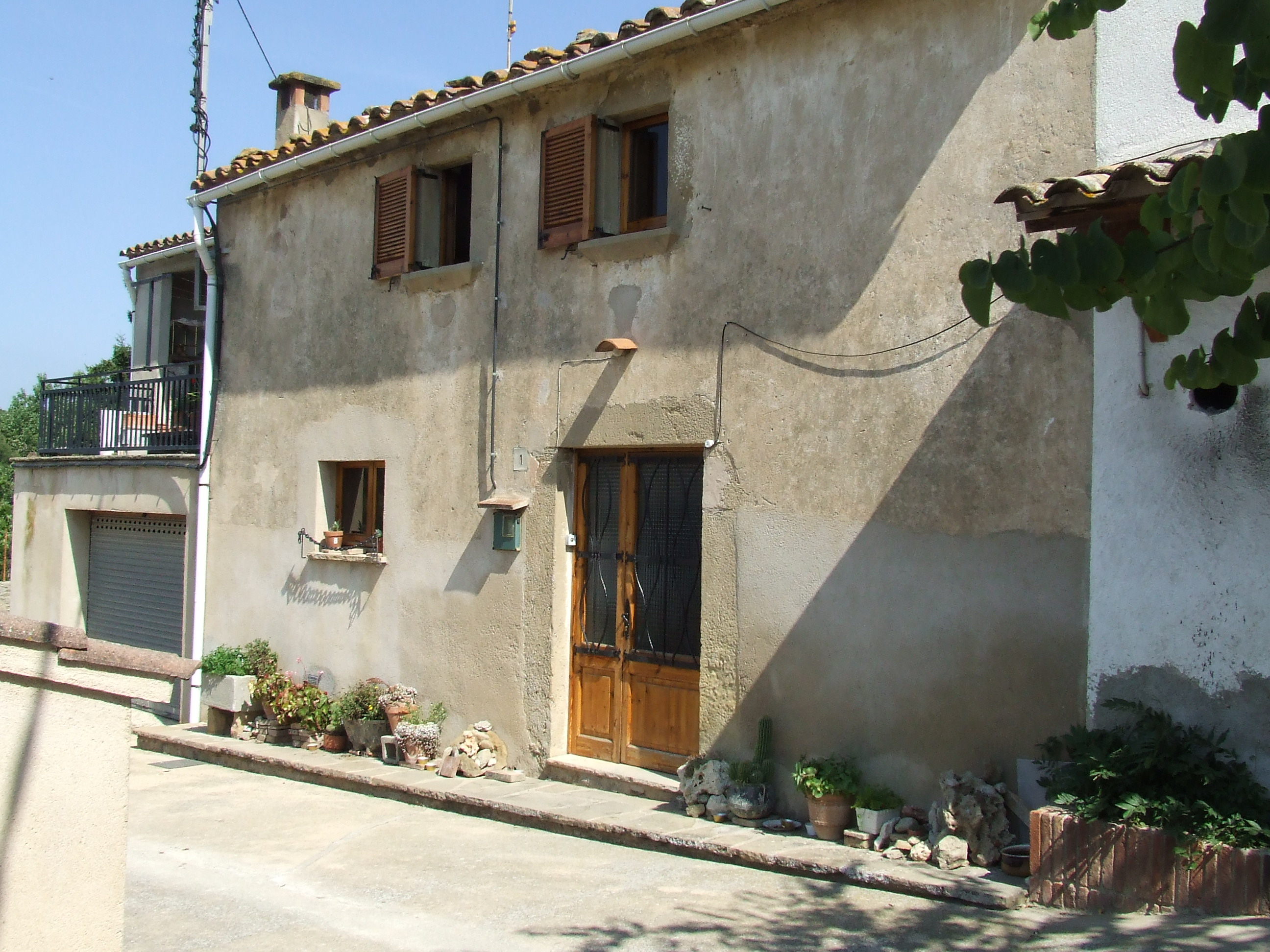 Cal Pastor (Castellcir, Moianès)